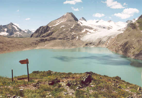 Griessee